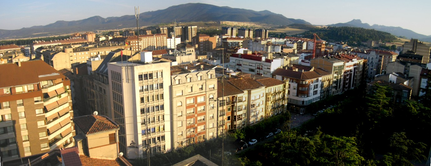 Vista panorámica del centro de la ciudad desde la torre del parque.